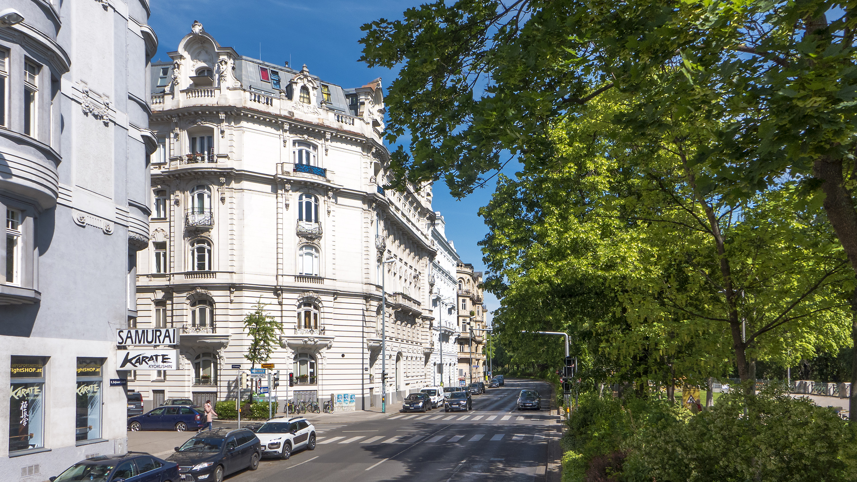 Rossauer Lände in Wien 9 bei Nr. 25. Im Bild das Gebäude Rossauer Lände 29 / Ecke Seegasse 29 von Rudolf Erdös aus dem Jahre 1909.